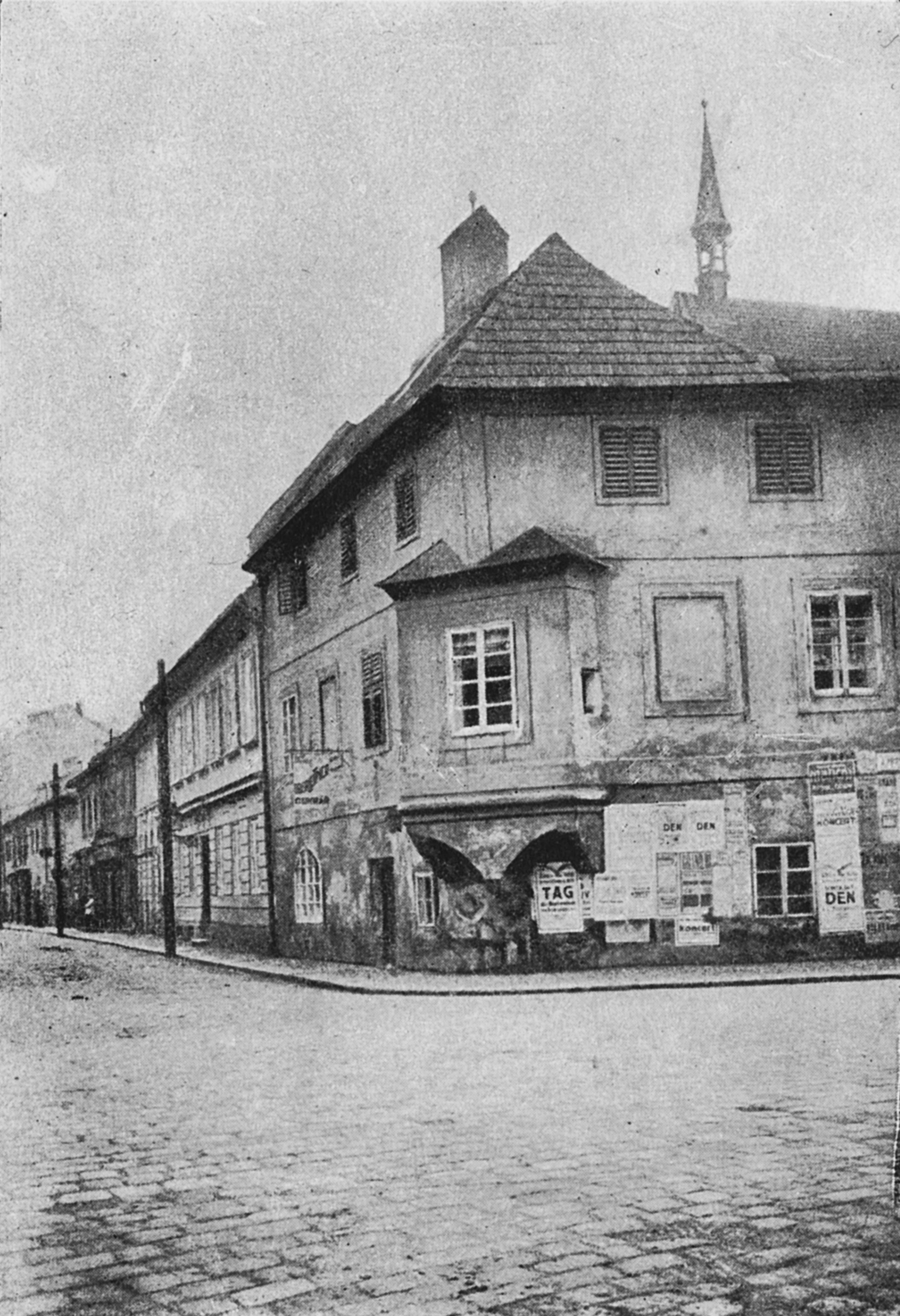 Album starých Budějovic. (orig. text: Nárožní dům s arkýřem v České ulici, z počátku 16. století.)